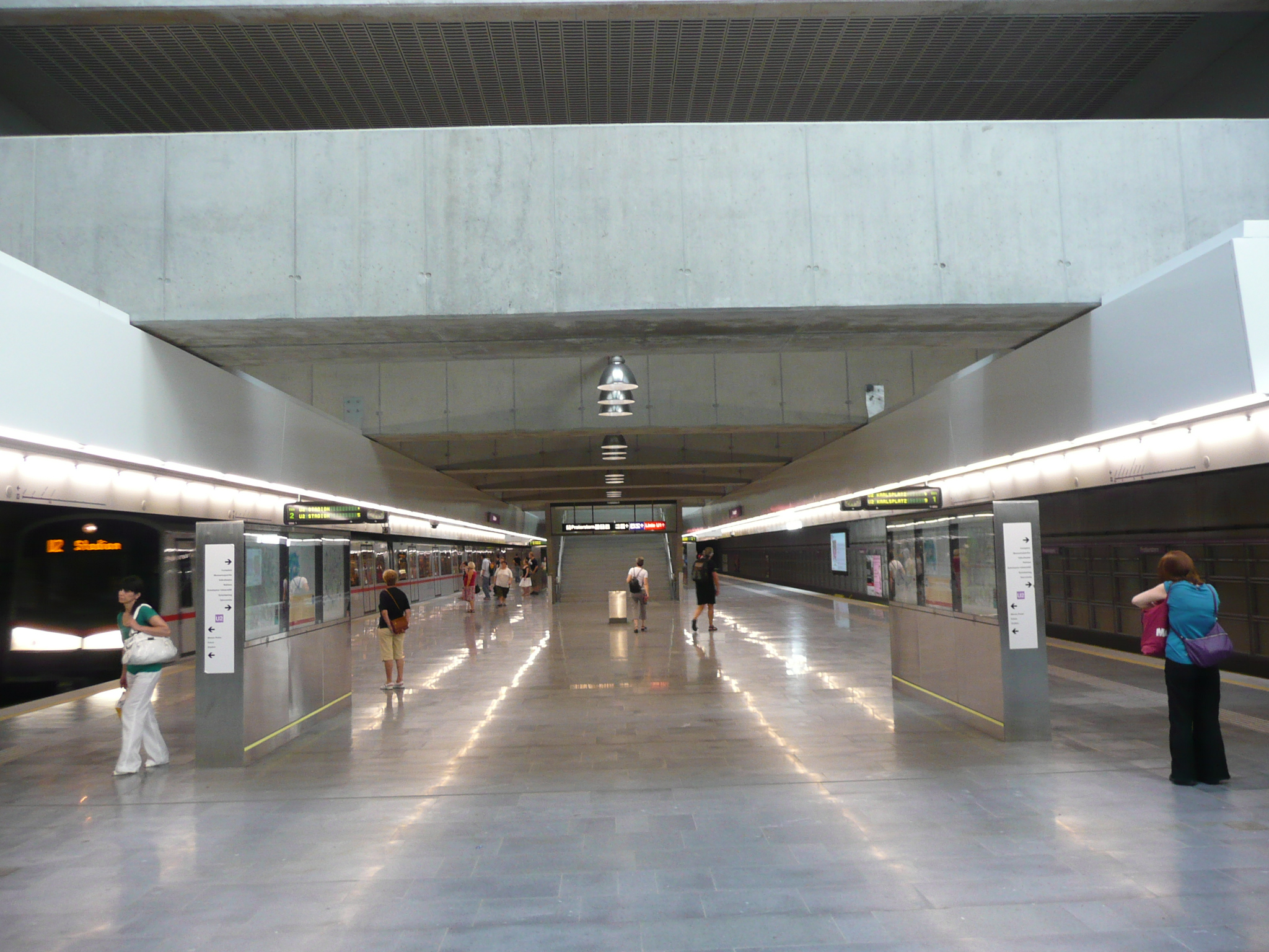 U2 Wien Praterstern.